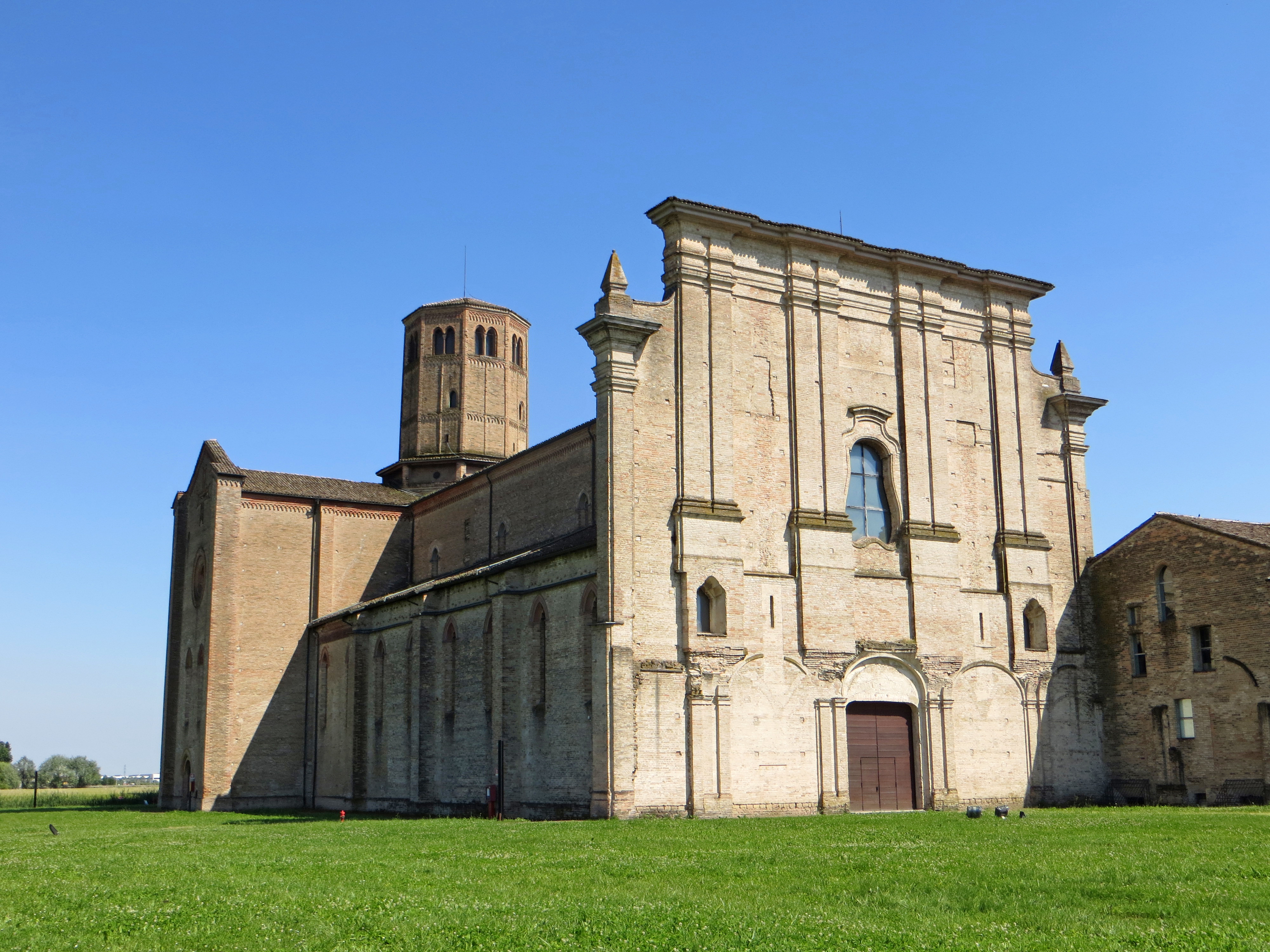 Abbazia di Valserena (Paradigna - Parma) - chiesa (facciata e lato nord)